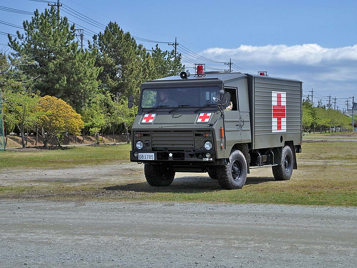 JGSDF Ambulance , 陸上自衛隊 1トン半救急車